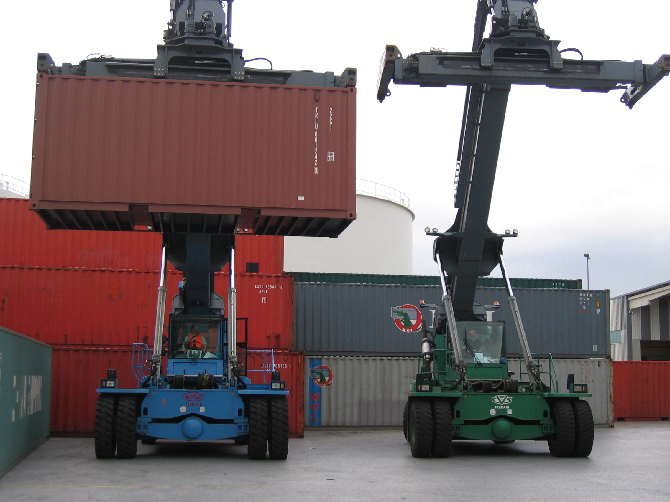 2 Reach Stacker fuer Leer Container, Author: Daniel Linsbauer(..me..)